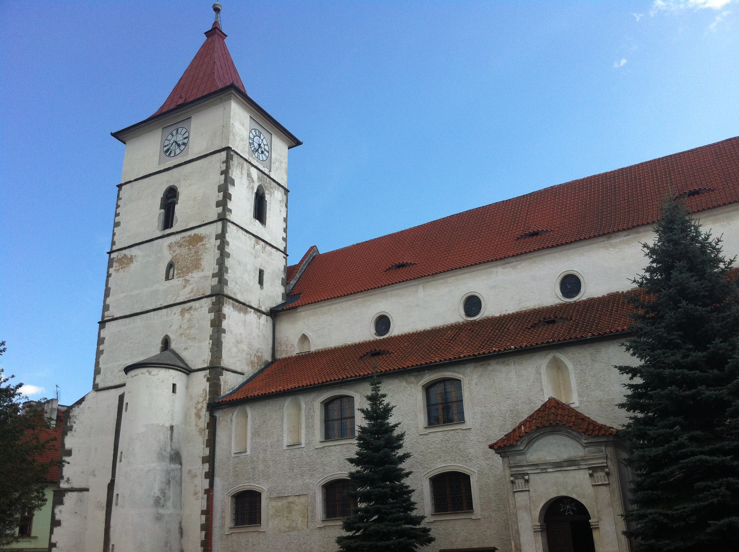 Kostel sv. Petra a Pavla (Horažďovice), Mírové nám., Horažďovice